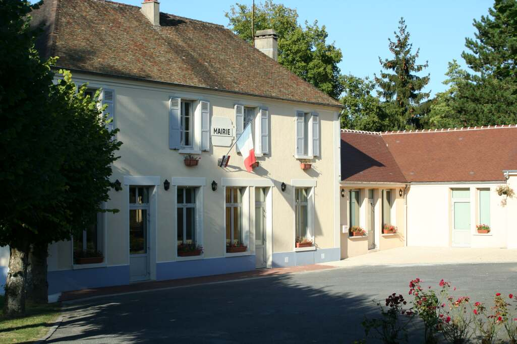 Mairie de Courgent - Yvelines (France)